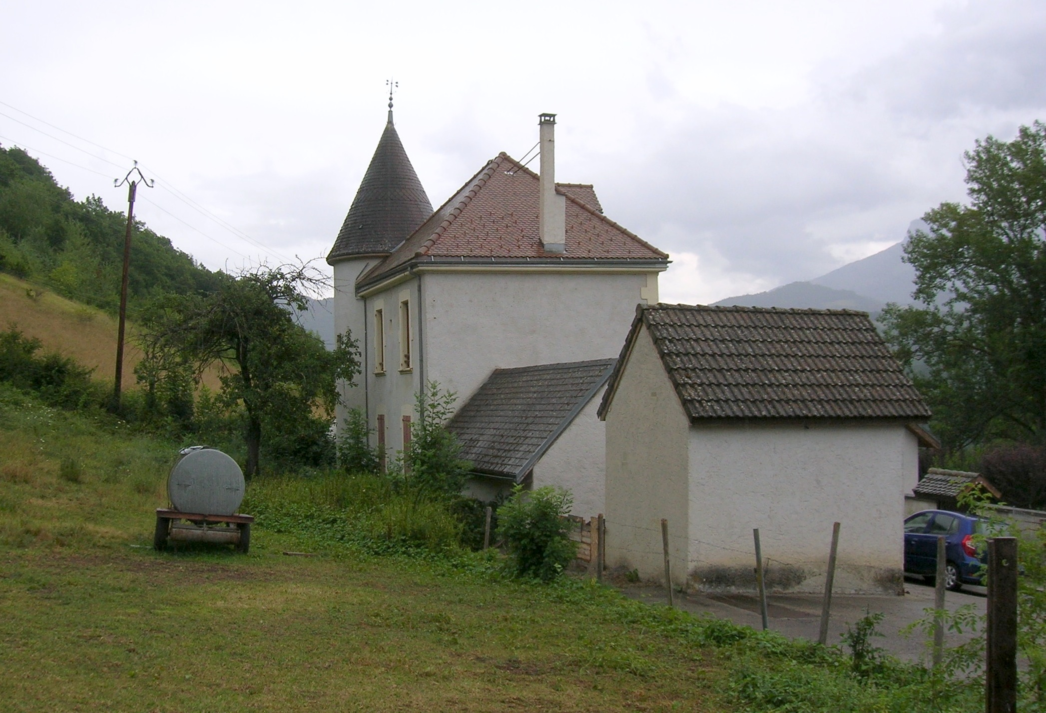 Saint-Arey (Isère), France.